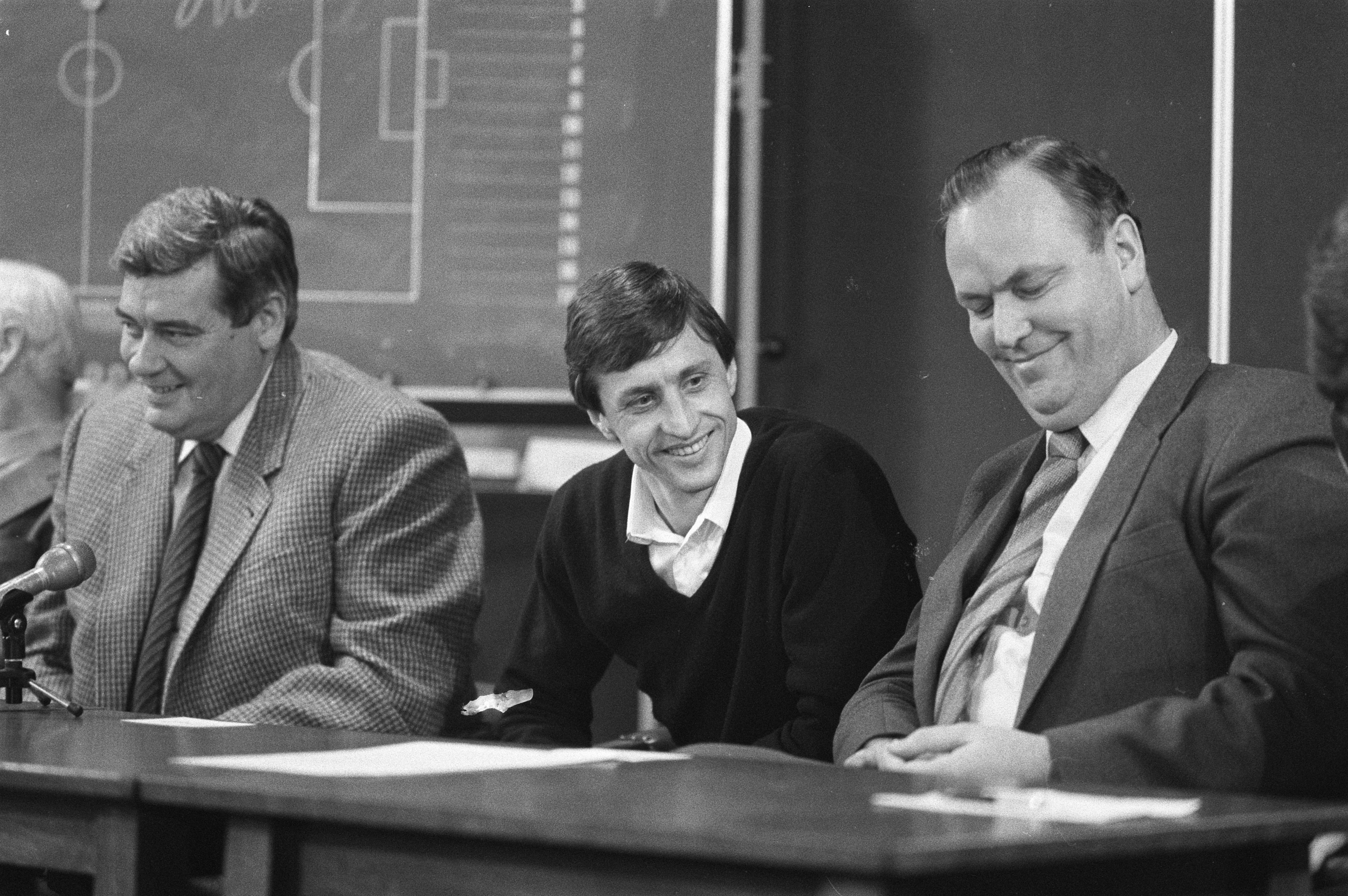 Collectie / Archief : Fotocollectie Anefo Reportage / Serie : Persbijeenkomst in het Ajax-stadion in verband met de terugkomst van Cruyff bij Ajax Beschrijving : Van links naar rechts voorzitter Harmsen, Johan Cruijff en secretaris Bartels Datum : 4 december 1981 Locatie : Amsterdam, Noord-Holland Trefwoorden : bestuurders, persconferenties, sport, trainers, voetbal Persoonsnaam : Bartels, Lou, Cruijff, Johan, Harmsen, Ton Fotograaf : Bogaerts, Rob / Anefo Auteursrechthebbende : Nationaal Archief Materiaalsoort : Negatief (zwart/wit) Nummer archiefinventaris : bekijk toegang 2.24.01.05 Bestanddeelnummer : 931-8431